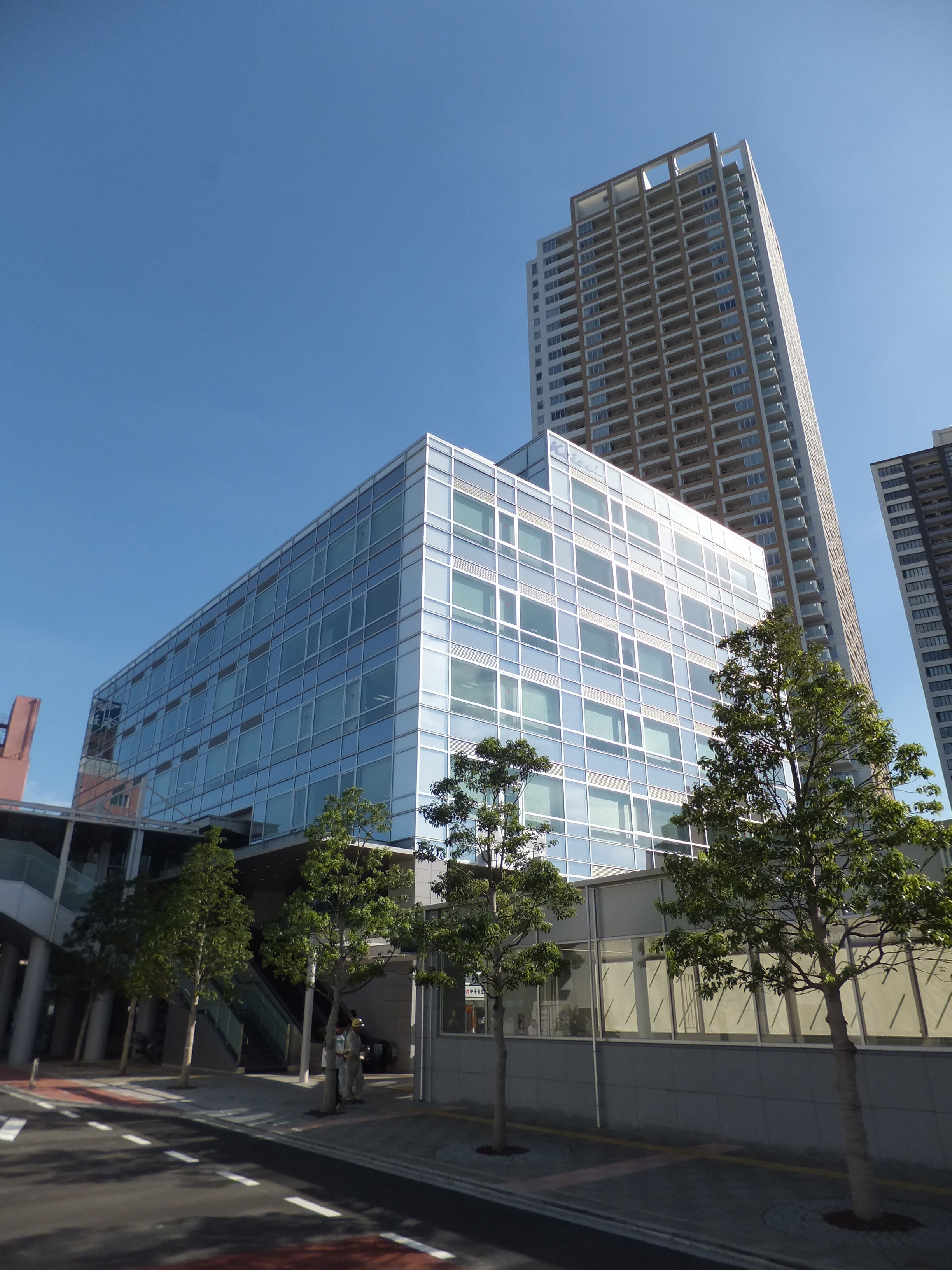 2013年9月17日から業務を開始した京成電鉄の新本社と、グランドターミナルタワー本八幡